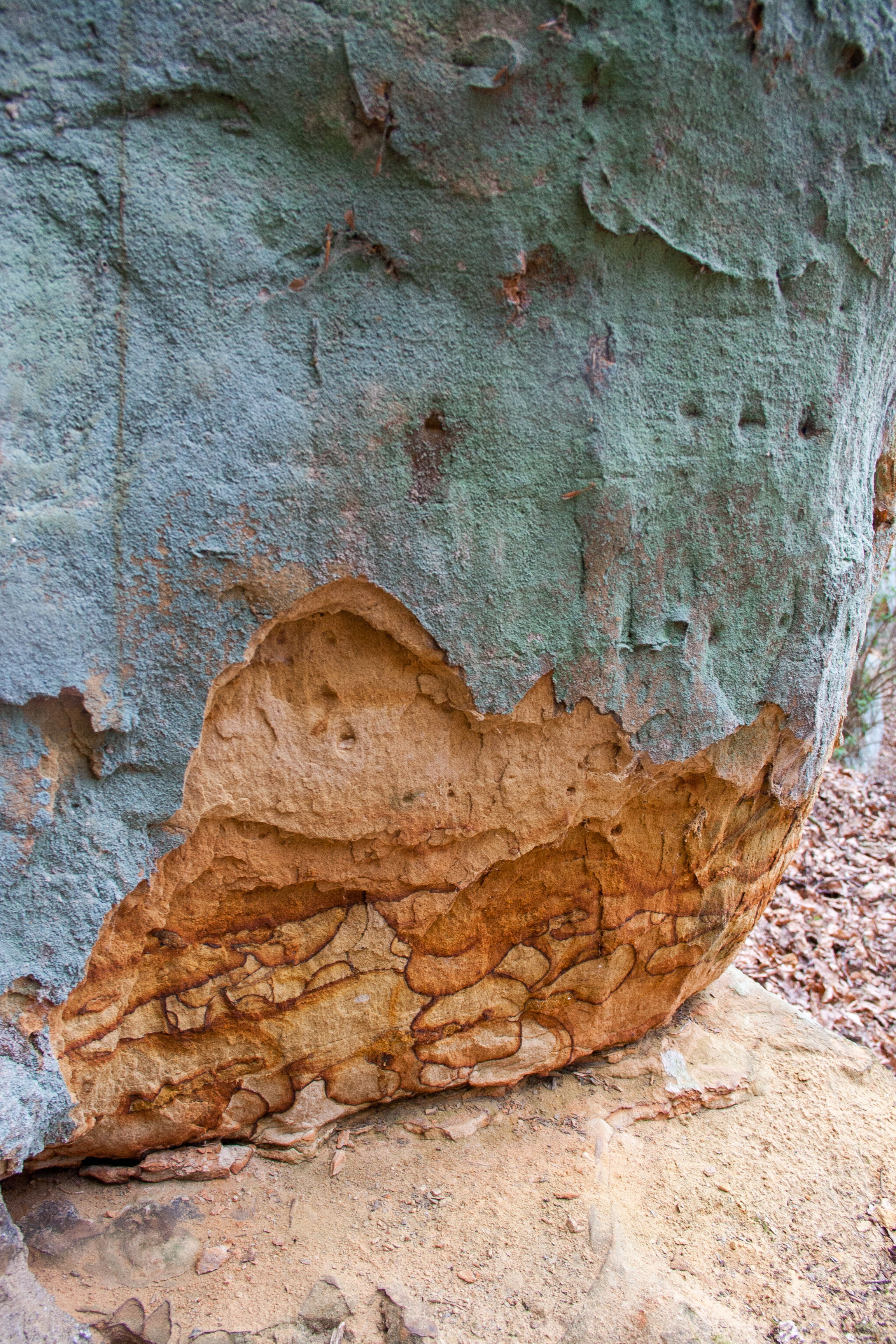 Geotop, Hohlweg bei Gspannberg, Berg bei Neumarkt in der Oberpfalz